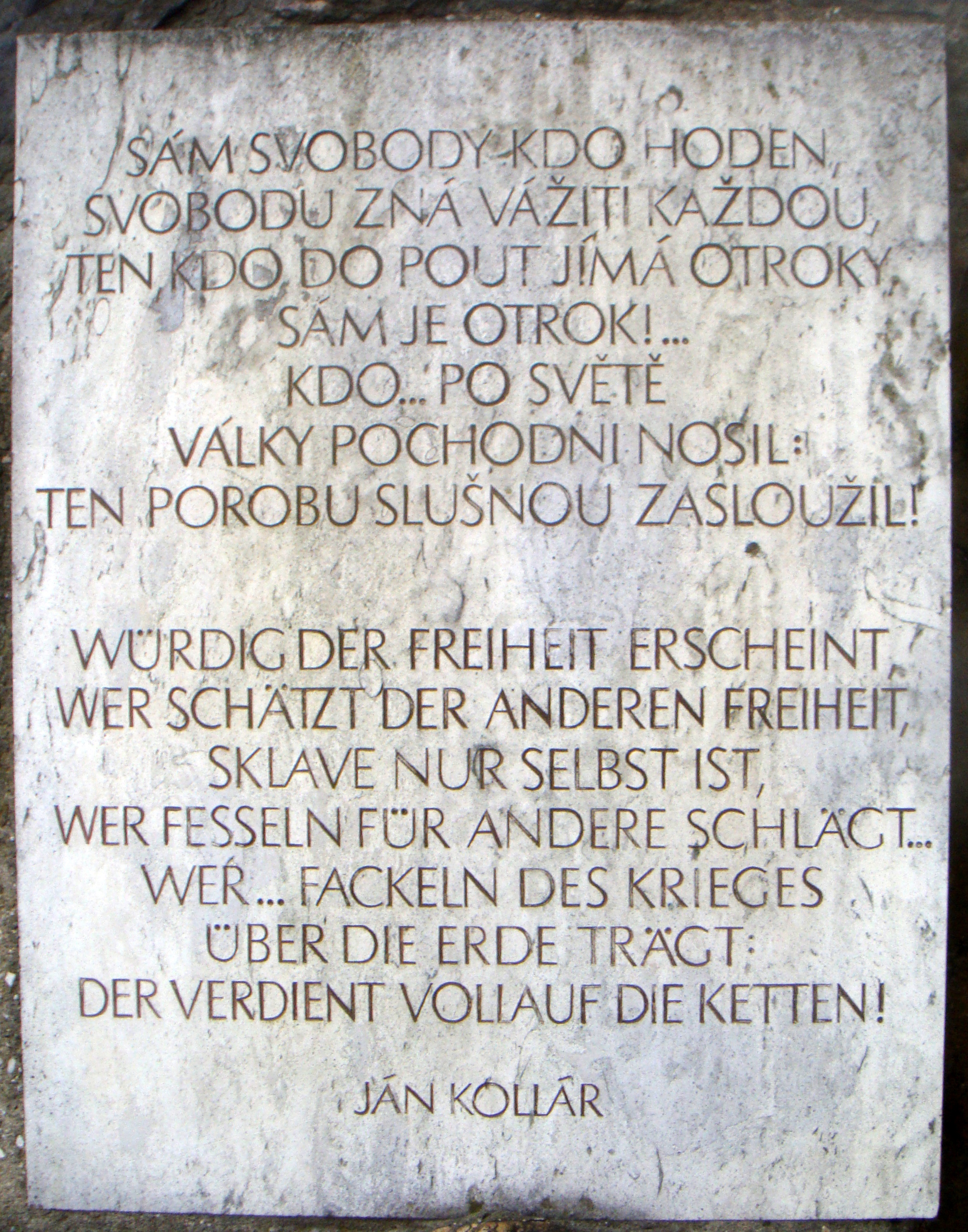 Gedenktafel für den slowakischen Dichter Ján Kollár in Jena-Lobeda-Altstadt